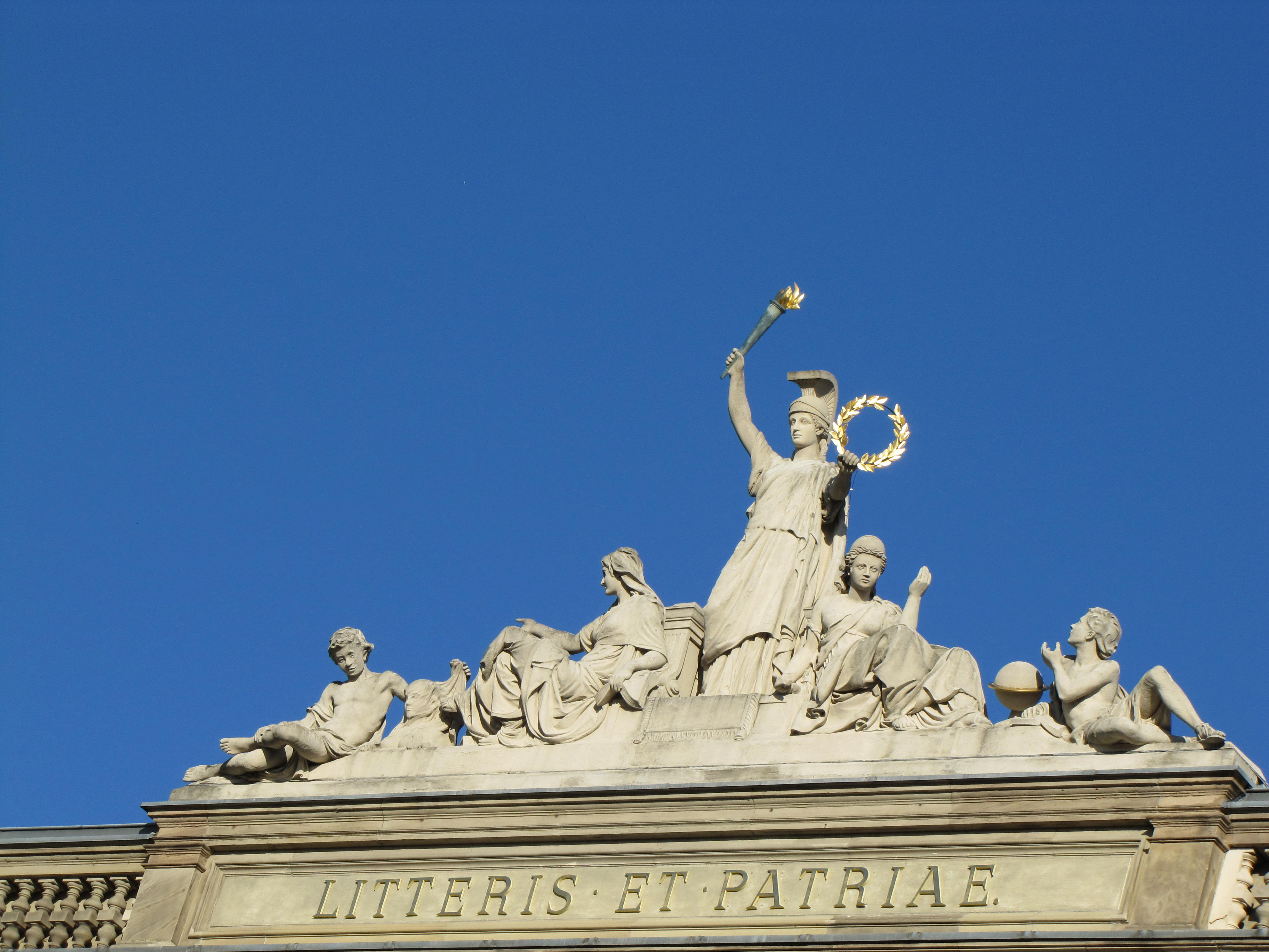 Alsace, Bas-Rhin, Strasbourg, Palais universitaire (XIXe), 9 place d'Université. This building is en partie classé, en partie inscrit au titre des Monuments Historiques.